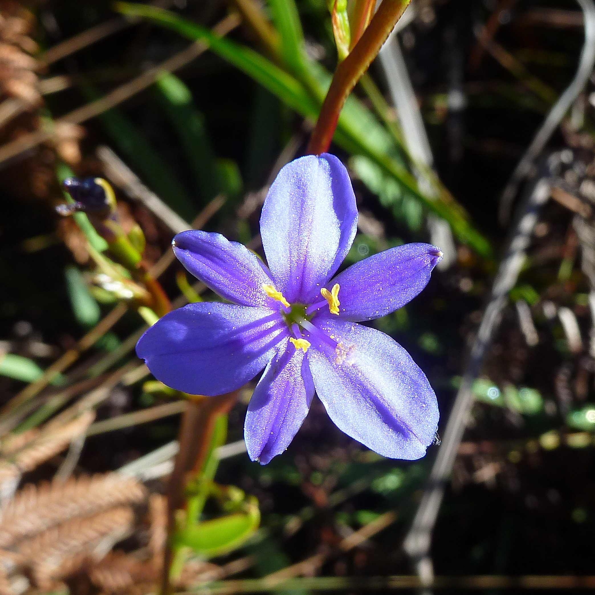 Aristea ecklonii im Nationalpark Horton Plains auf Sri Lanka